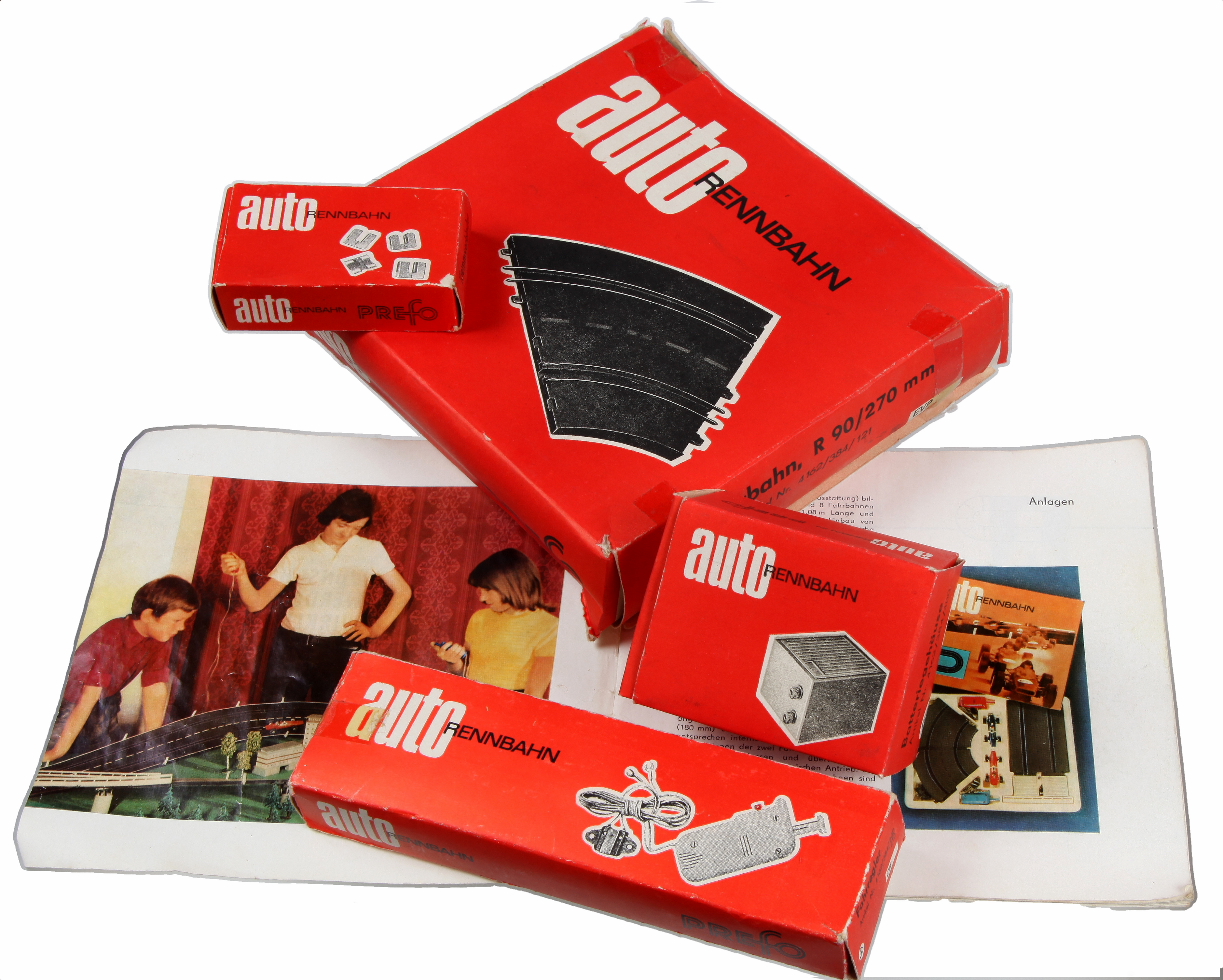 Prefo Autorennbahn: Verpackungsmaterial, Bedienungsanleitung